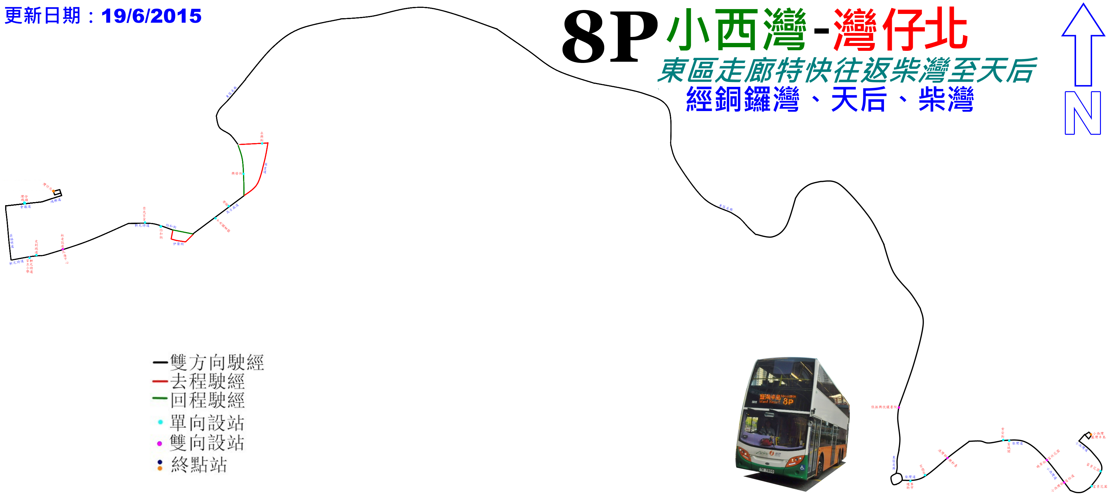 中文（香港）: 新巴8P線的走線圖